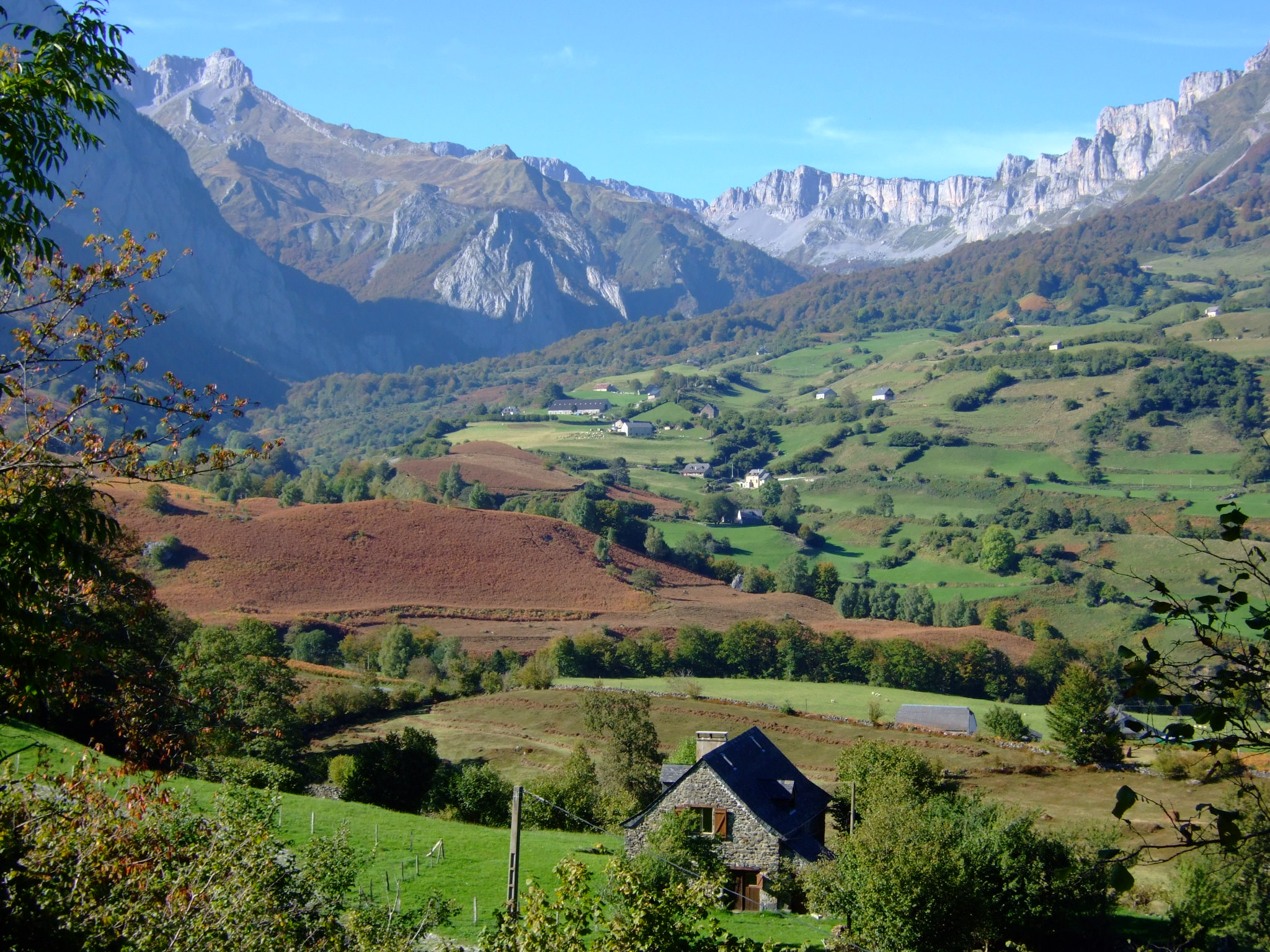 Lescun (Pyrénées-Atlantiques, Aquitaine, France) - Vue en direction du Pas d'Azuns, depuis le GR 10.